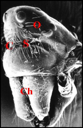 Prosoma d' Argyrodes de type "camard" au microscope à balayage.